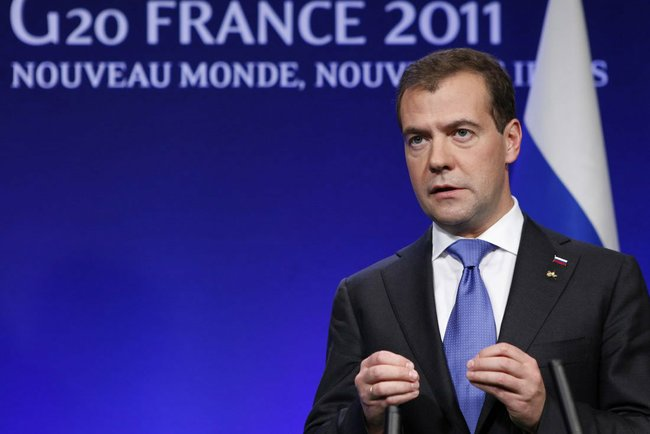 Пресс-конференция по итогам саммита «Группы двадцати».